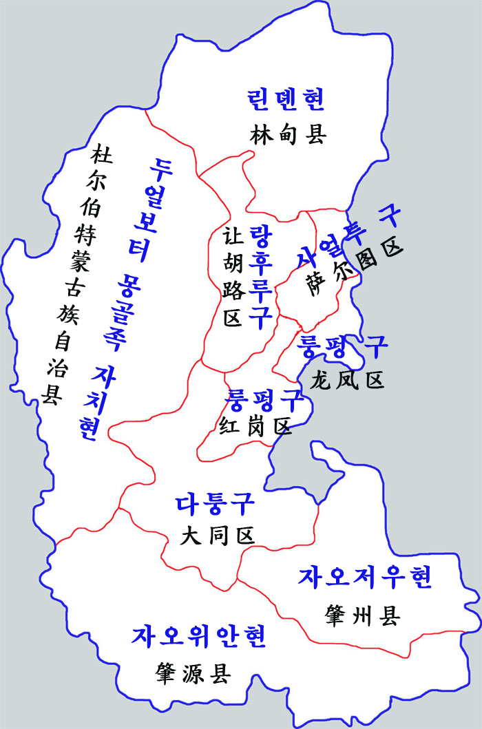 다칭시 현급구역도